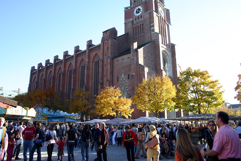 Auer Dult